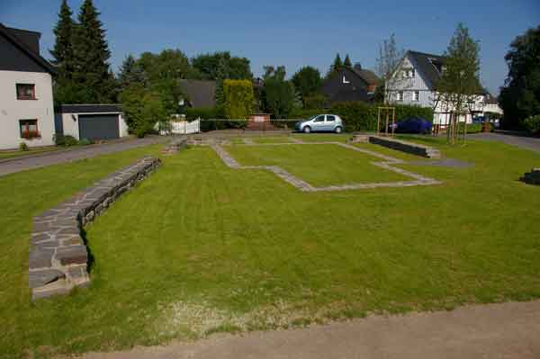 Grabungsbefund als Mauernverlauf